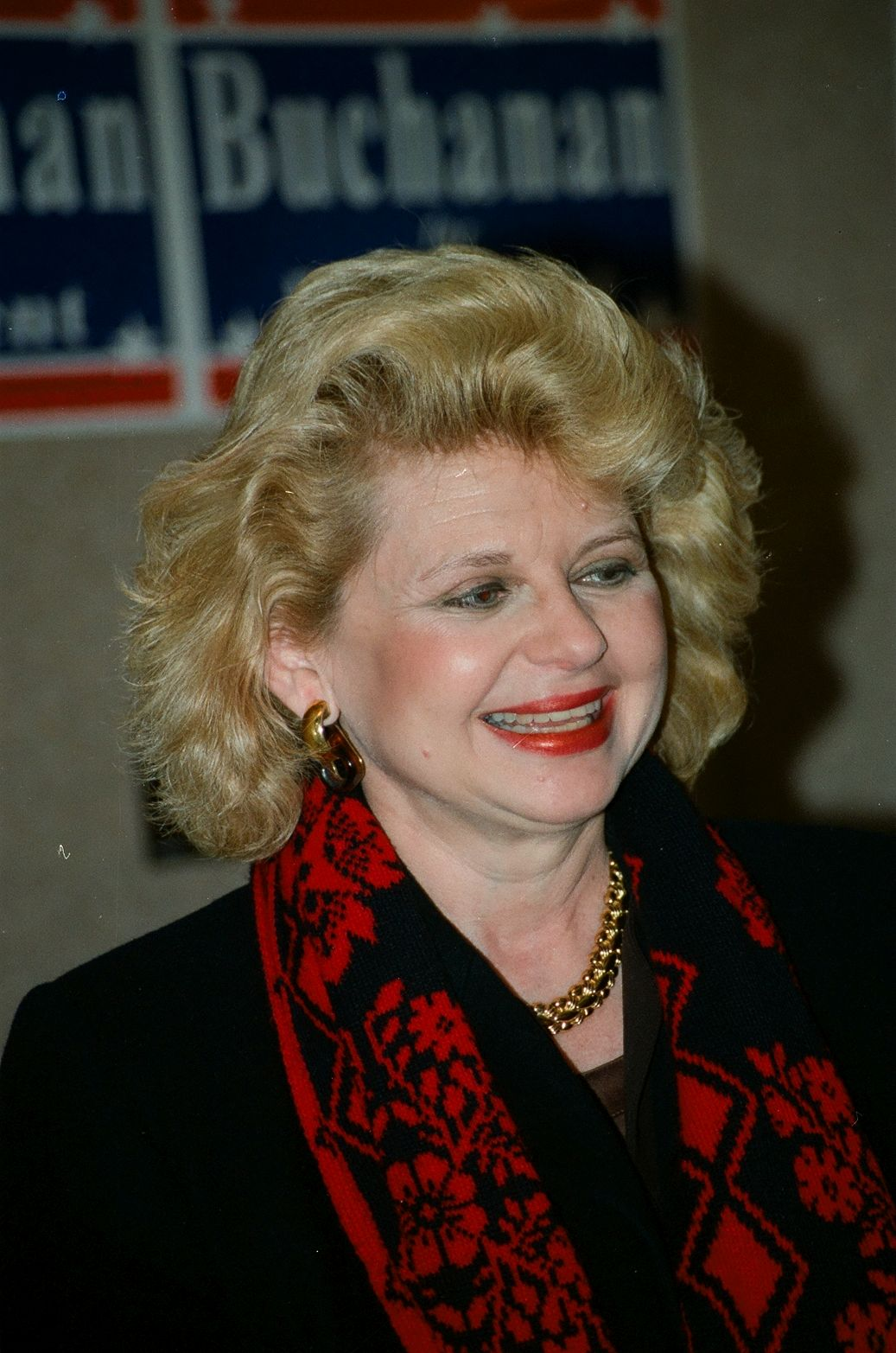 Baltimore M.D. 1996